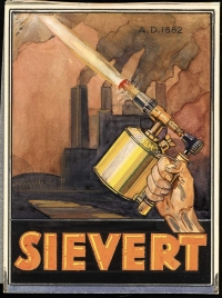 Blåslampa